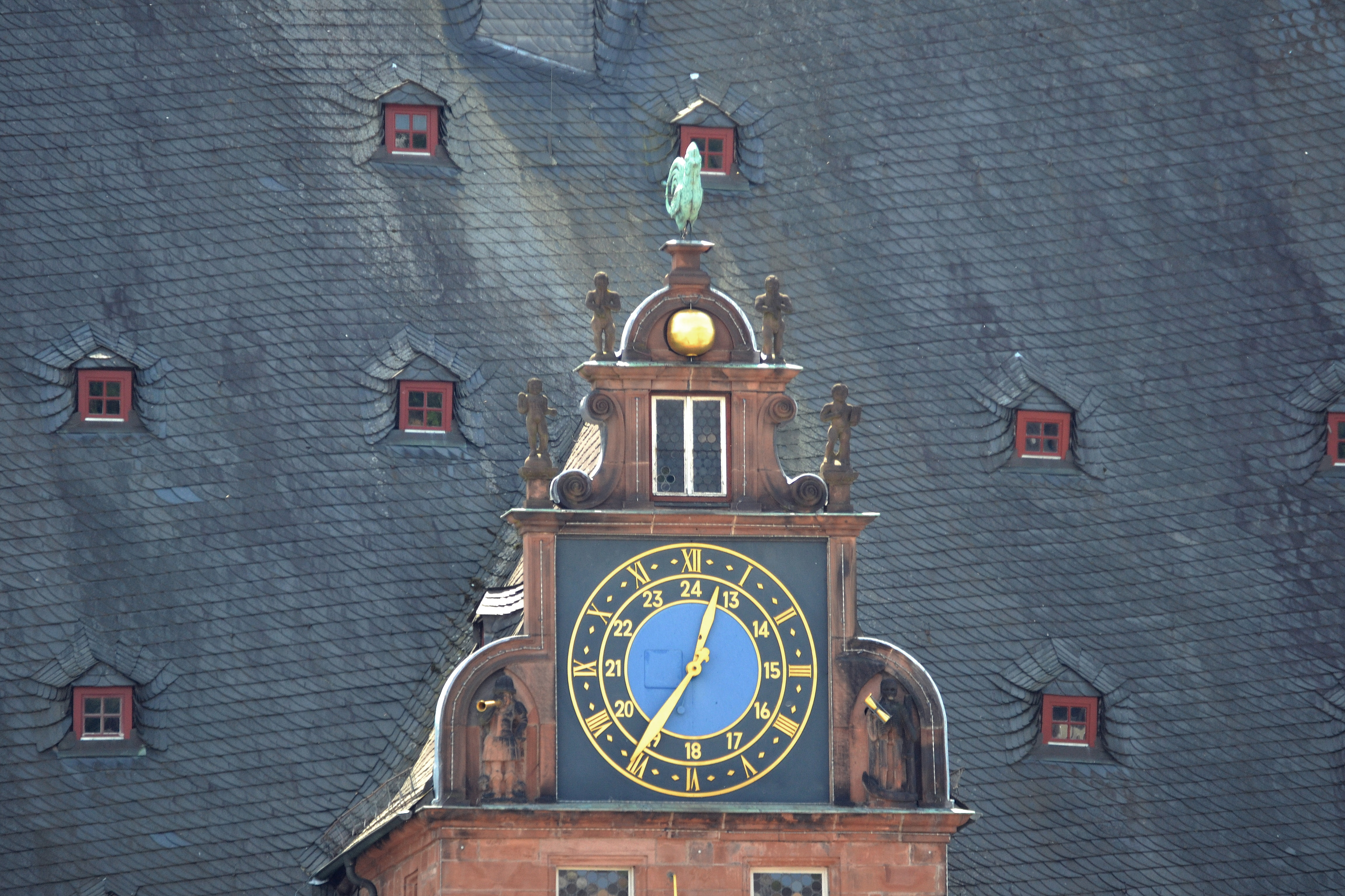 Rathausuhr Marburg um 12:35 Uhr mit nahezu goldener Erdkugel (keine Mondkugel) zur Mittagszeit am 26. Mai 2016 (← Vergleich mit dem Mondkalender). An der Spitze des Dachgiebels der zu jeder Stunde mit den Flügeln schlagende und krähende Gockel.